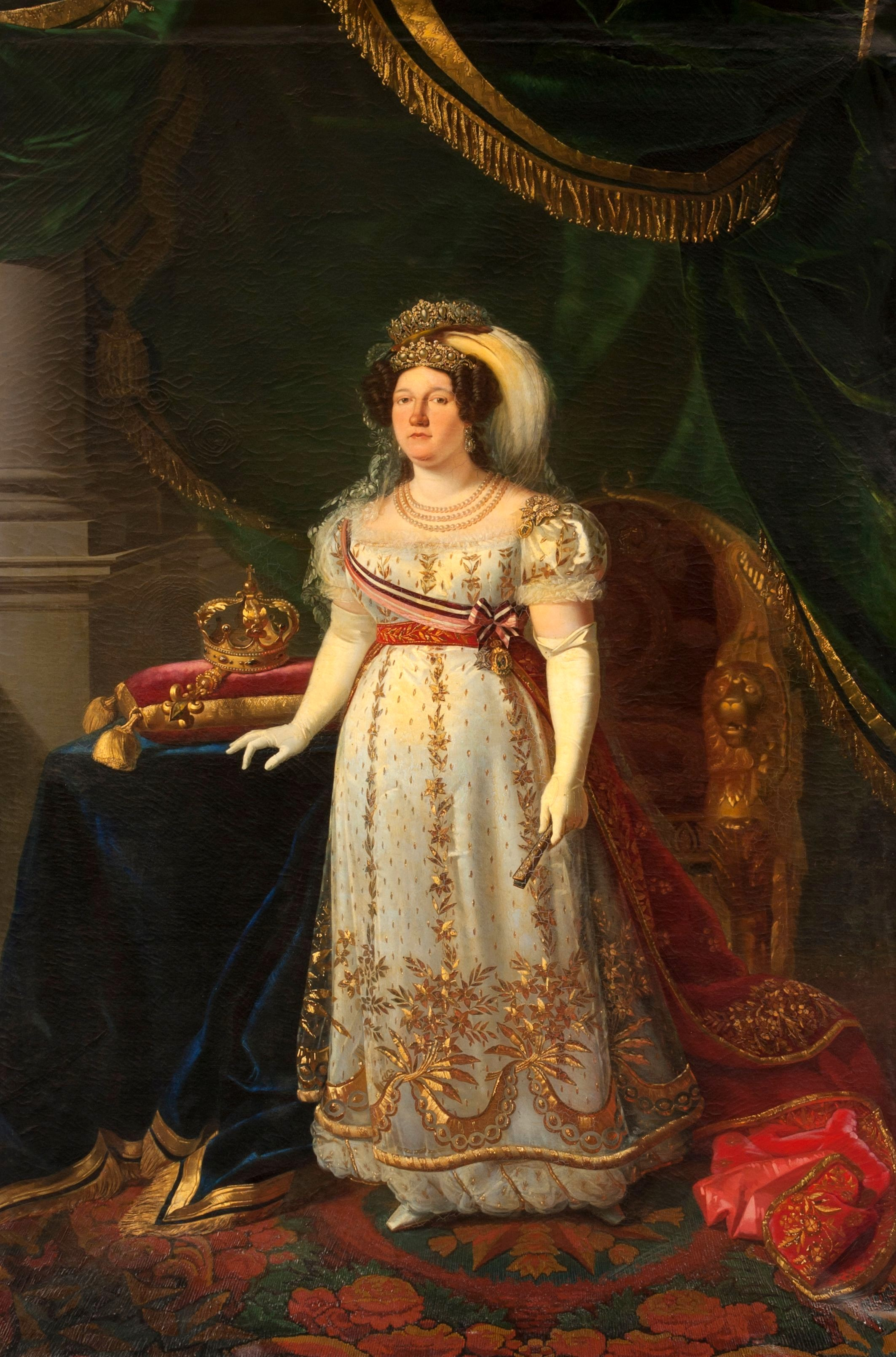 Ritratto di Maria Isabella di Borbone